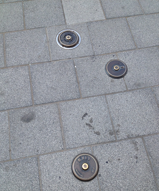 מיקום שובל ברצח רבין